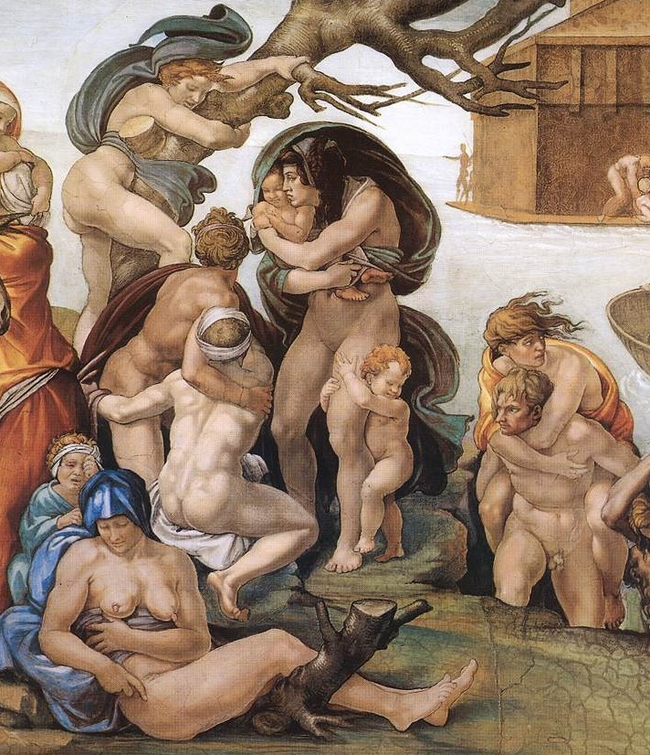 Sistine Chapel, fresco Michelangelo.